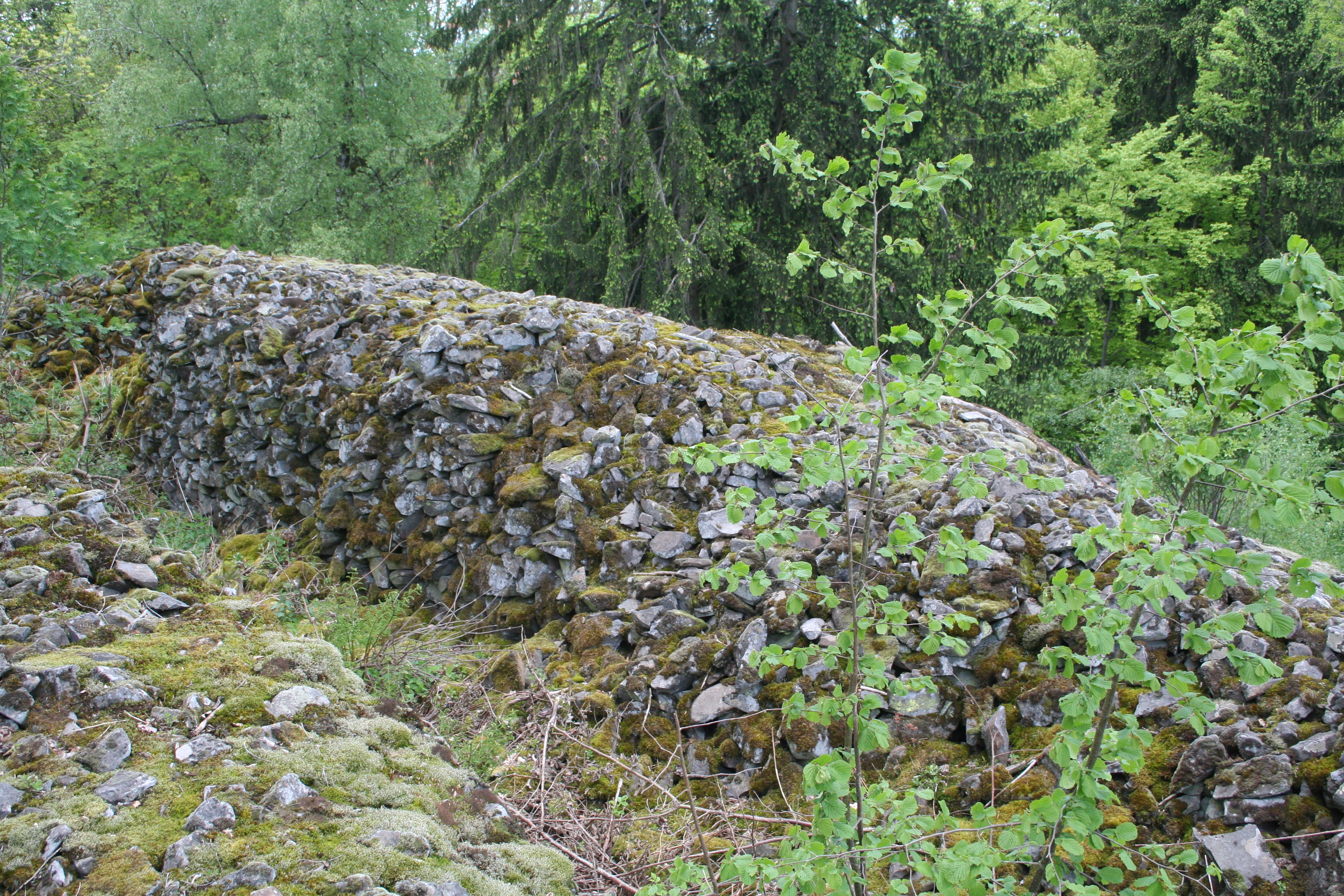 Steinsburg